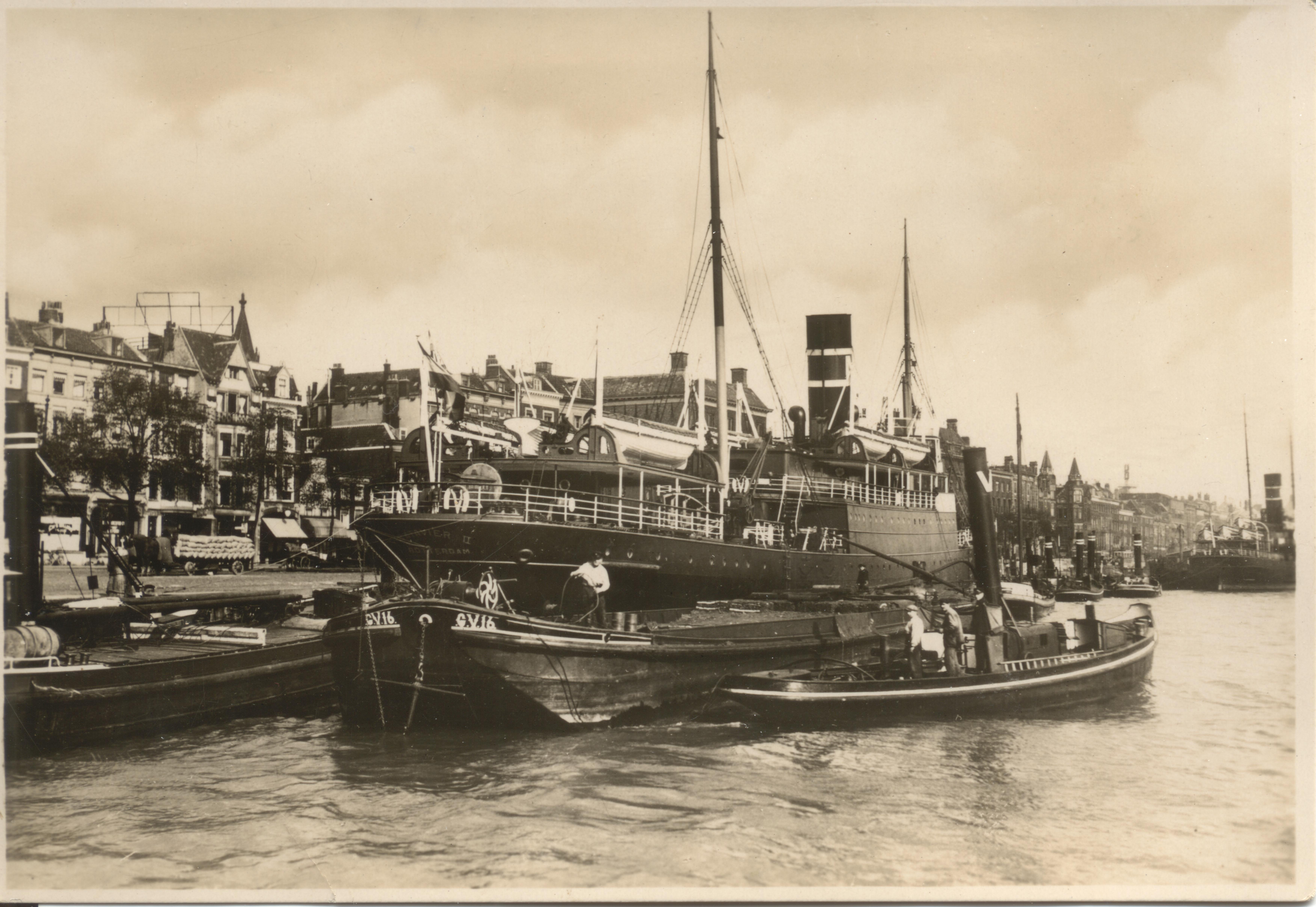 Postkaart - Hr. Ms. Batavier II in Rotterdam